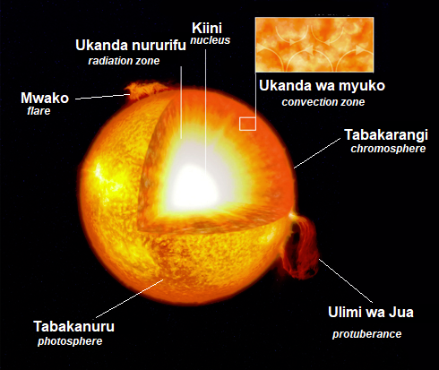 Kiswahili: Kanda mbalimbali zinazounda muundo wa Jua